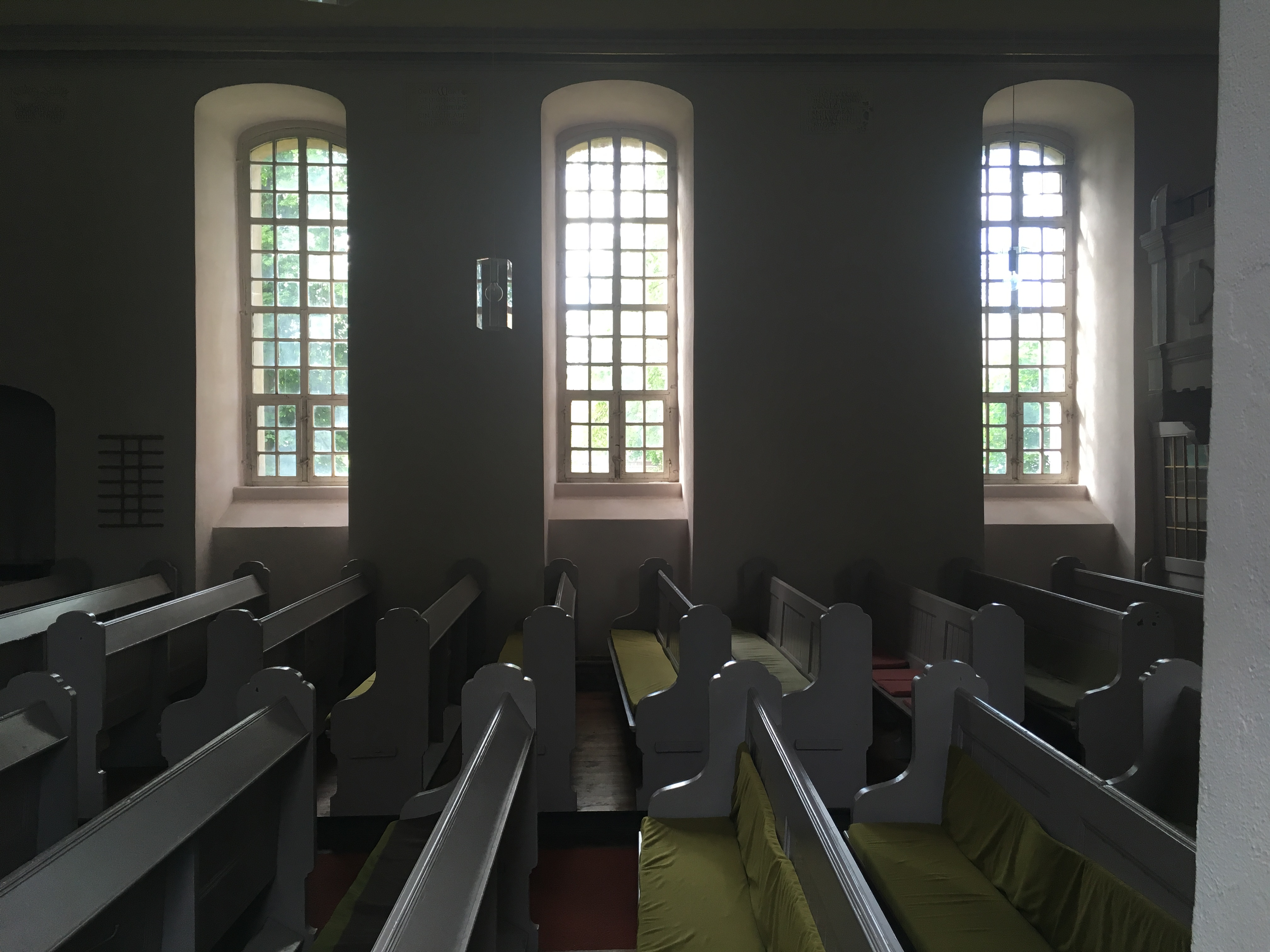 Die Hoffnungskirche in Rüdersdorf bei Berlin ist eine Feldsteinkirche aus dem 13. Jahrhundert, die 1718 und 1790 nach Osten hin erweitert wurde.